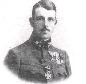 Habsburg–Toscanai Ferenc Károly Szalvátor főherceg (1893–1918)